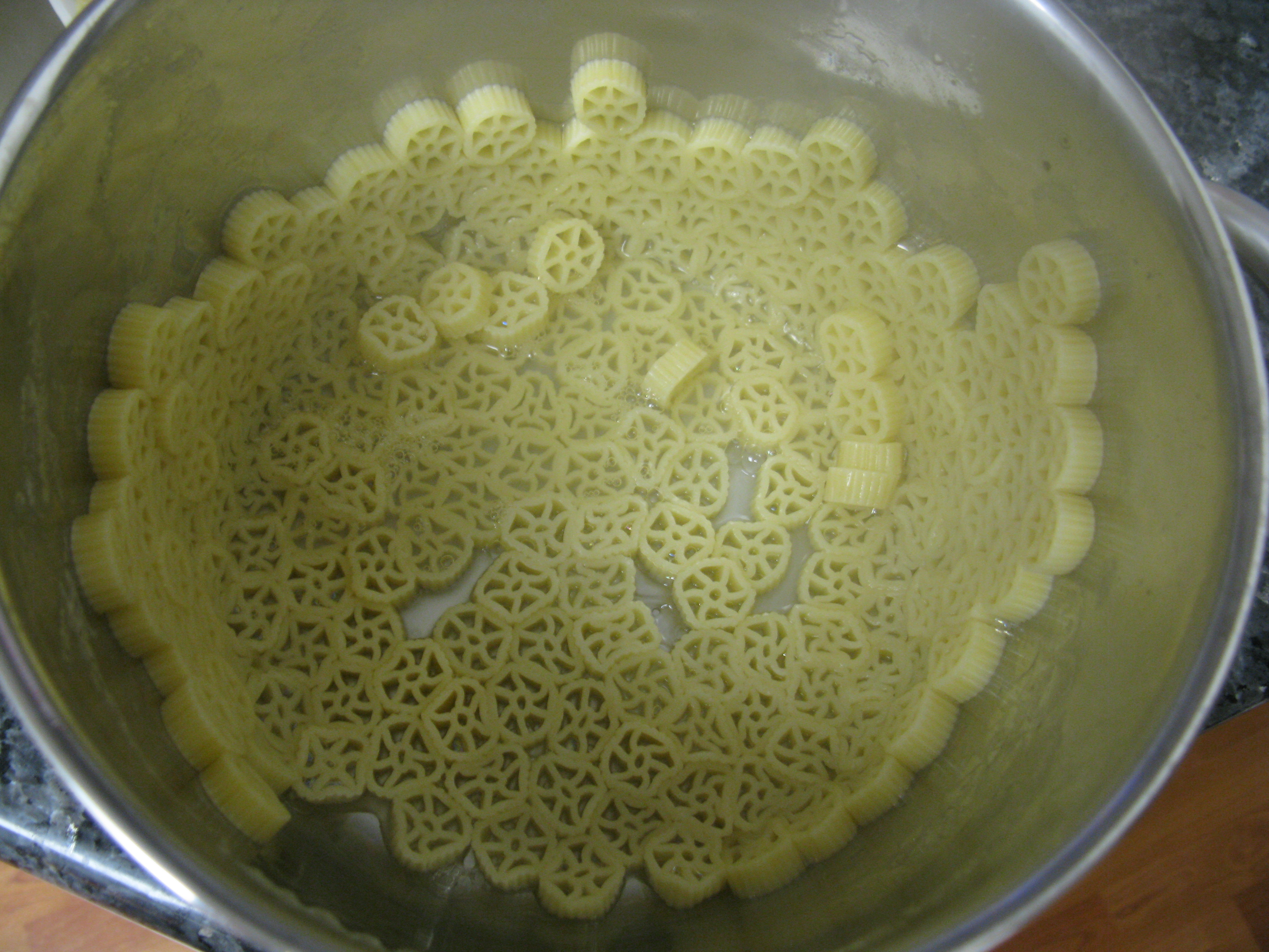 Rotelle in a pot.